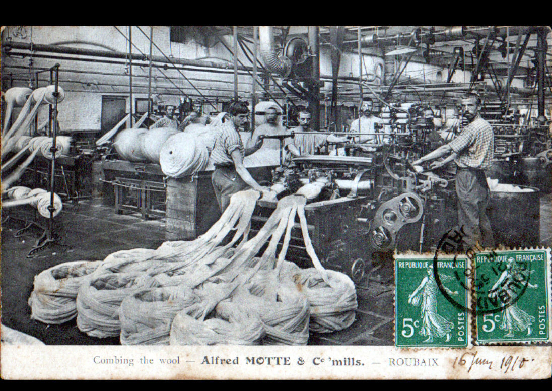 Usine Alfred Motte à Roubaix, CPA circulée le 16 juin 1910.